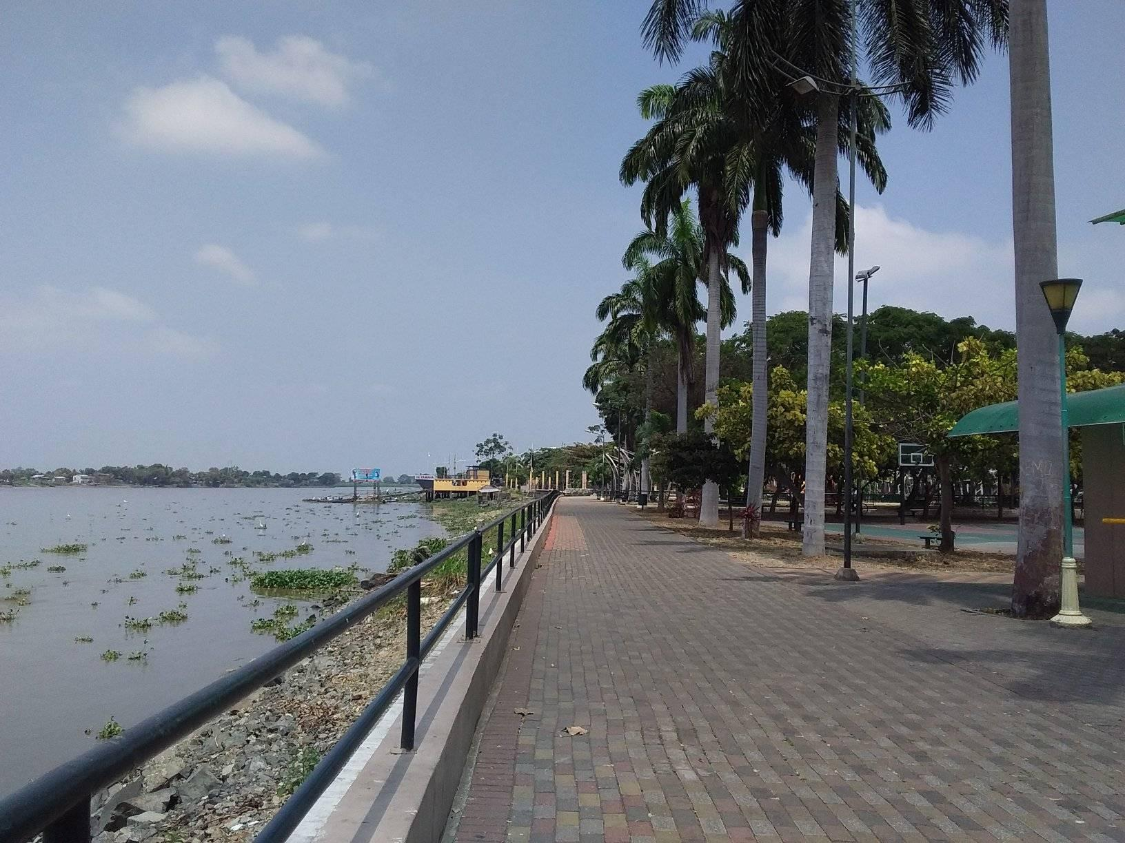 Malecón de Samborondón, a orillas del río Babahoyo.